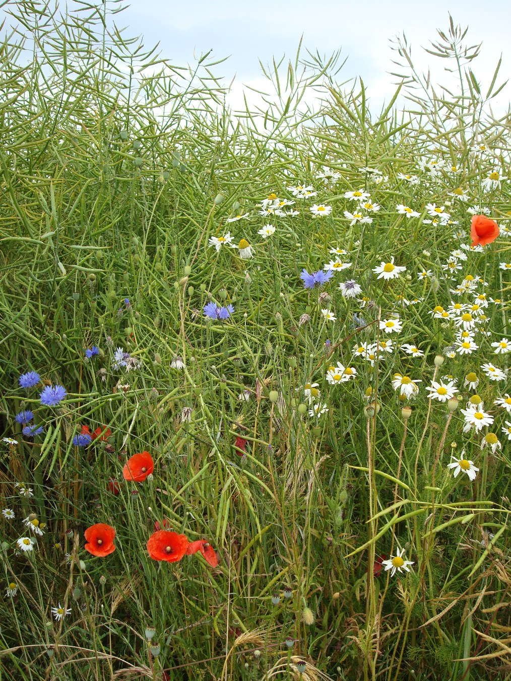 Wiese bei Schloss Spyker